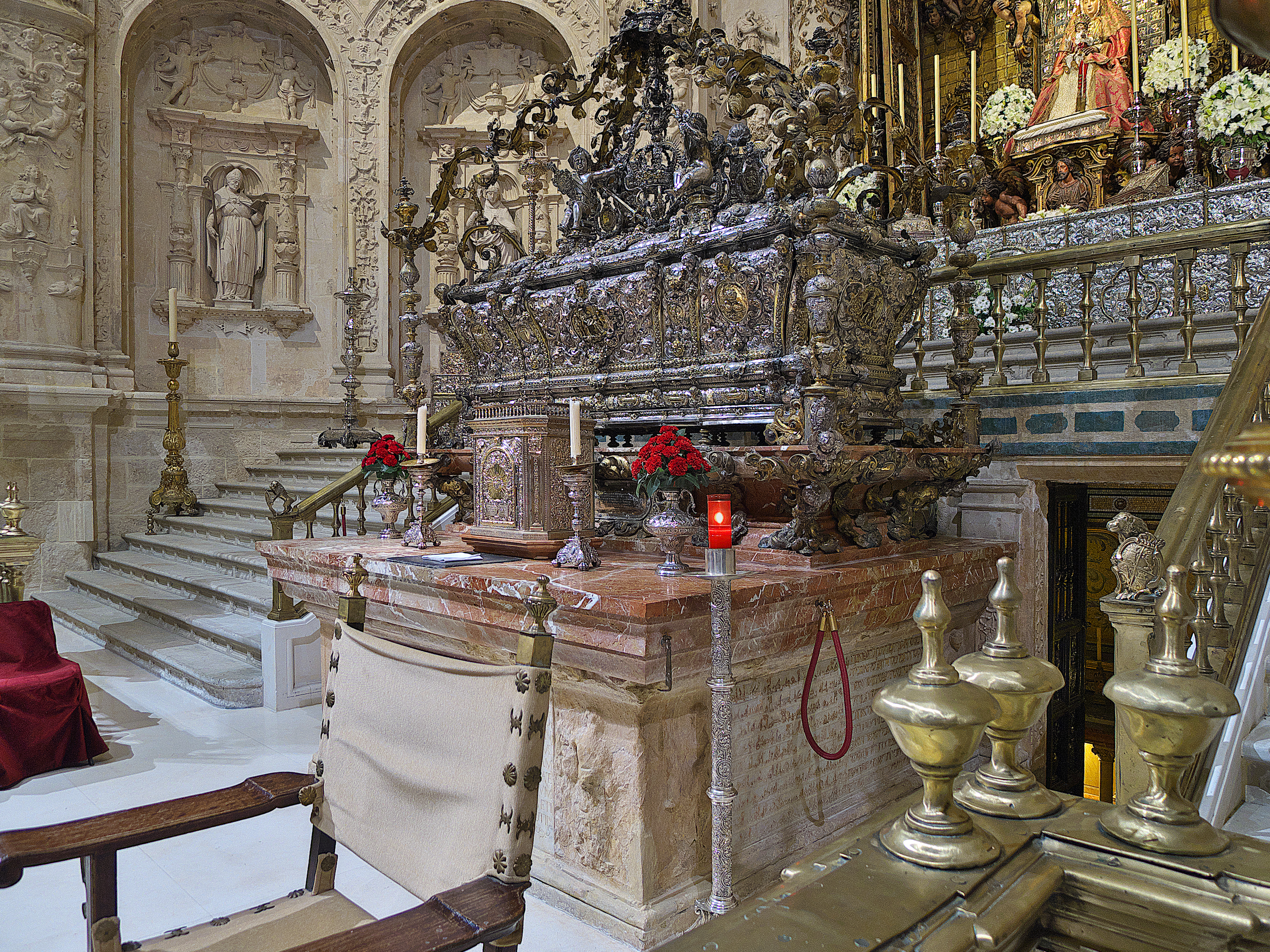 La urna barroca de plata en la que descansa el cuerpo incorrupto del rey Fernando III el Santo se halla en la Capilla Real de la catedral de Sevilla y es considerada la obra cumbre de la orfebrería barroca española. Fue realizada por el orfebre gaditano Juan Laureano de Pina entre 1690 y 1719, y de este mismo autor también se conservan otras obras en la catedral hispalense. A pesar de que el rey Fernando III, que era «prudente y esforzado en las batallas; benigno y misericordioso después de la victoria, modesto y templado en los triunfos», había dispuesto que su sepultura fuera humilde y sencilla y que estuviera situada a los pies de la Virgen de los Reyes, su hijo Alfonso X íncumplió lo estipulado por su padre y construyó para él un sepulcro ostentoso.